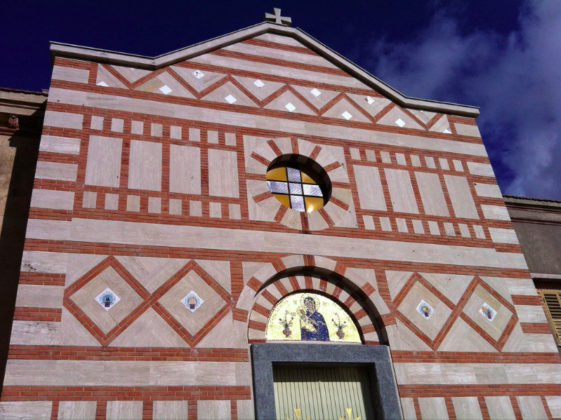 Chiesa del monastero basiliano Santissimo Salvatore alla Sclizza, Piana degli Albanesi (PA)